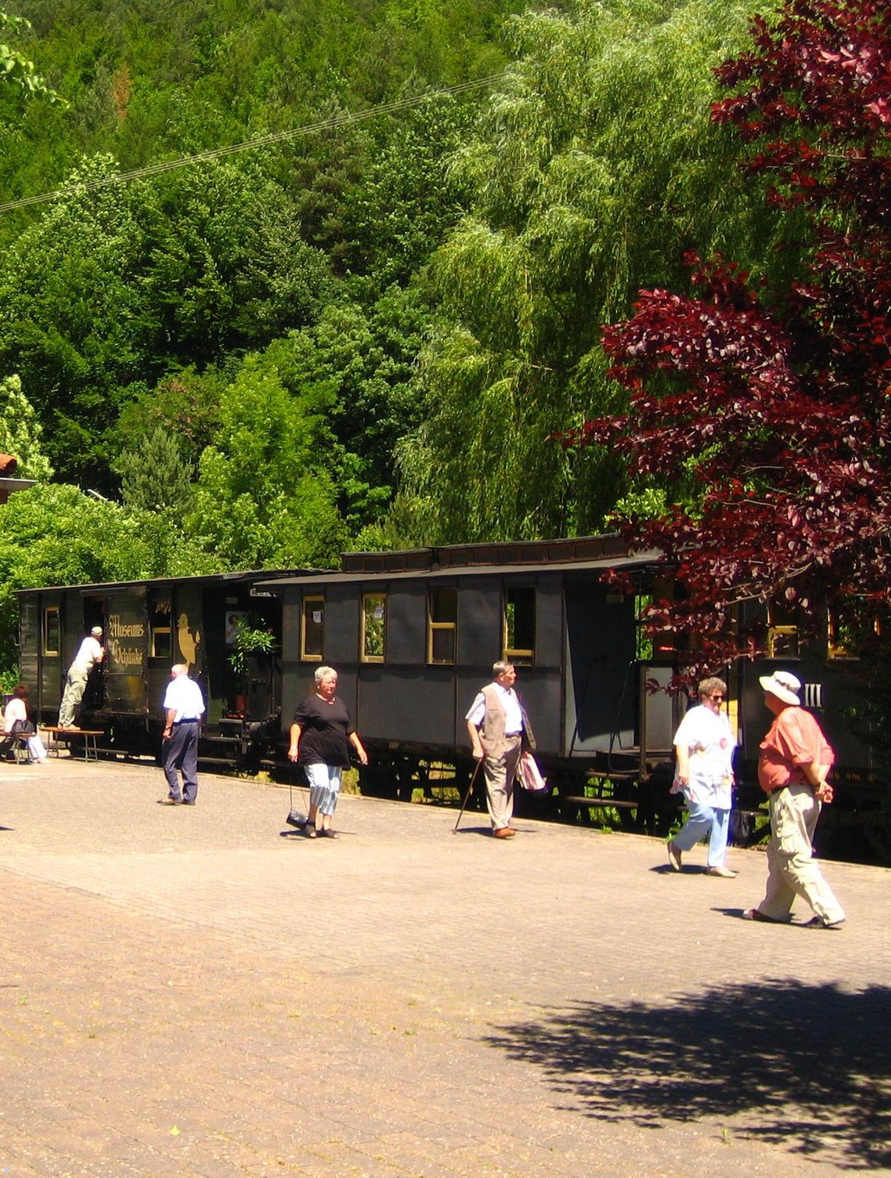 Museumsschänke des Kuckucksbähnel, selbst Fotografiert )